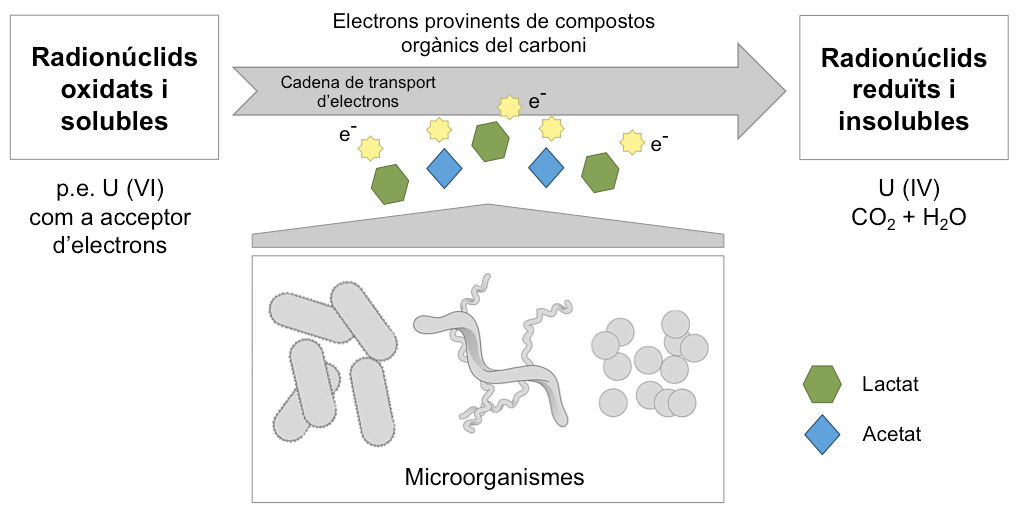 Esquema de la reducció enzimàtica directa de radionúclids per mitjà de microorganismes. Adaptat de Prakash et al., 2013 i de File:Bacteria morphologic forms simplified.svg.